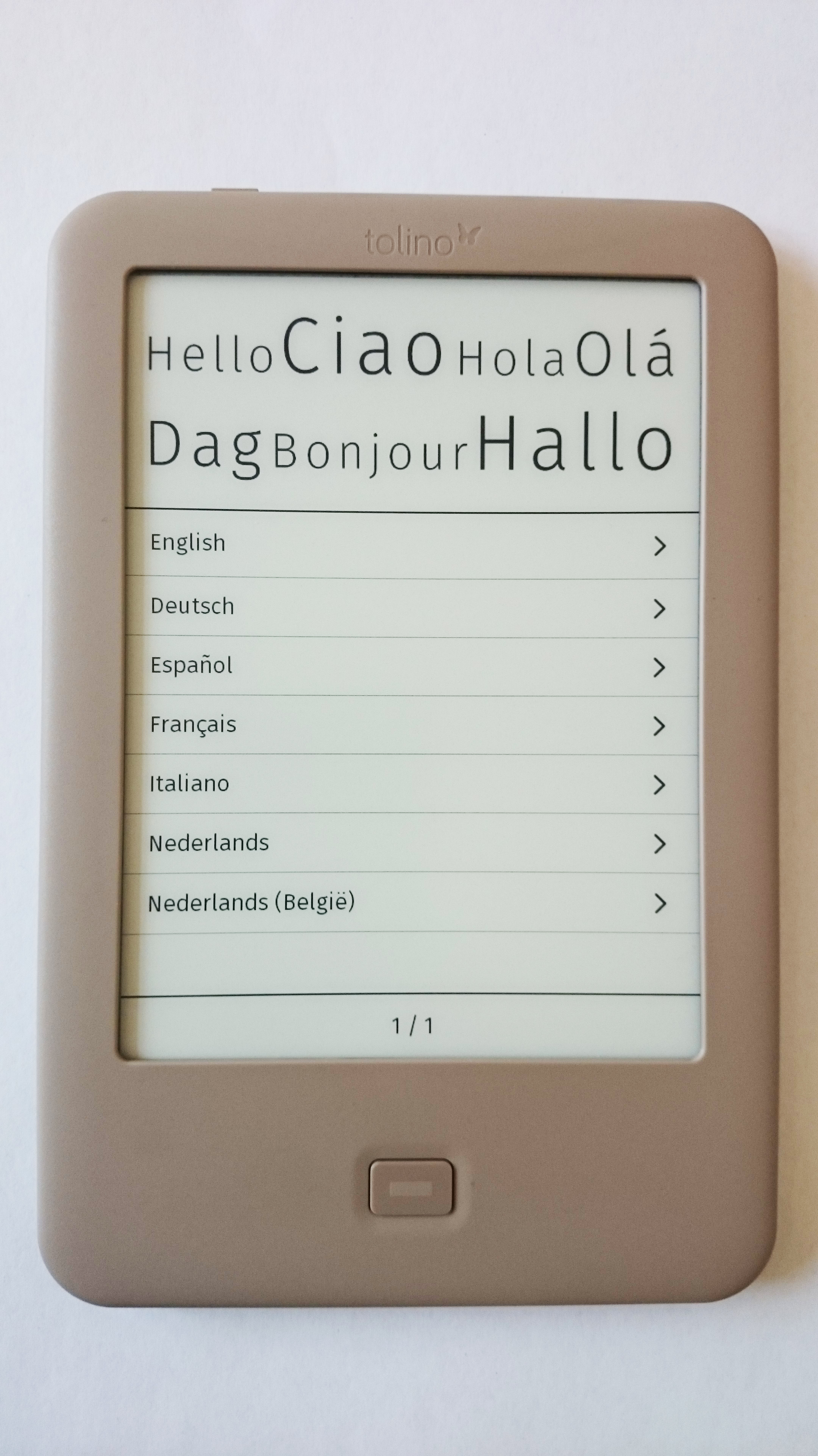 tolino page in der Vorderansicht mit Bildschirm